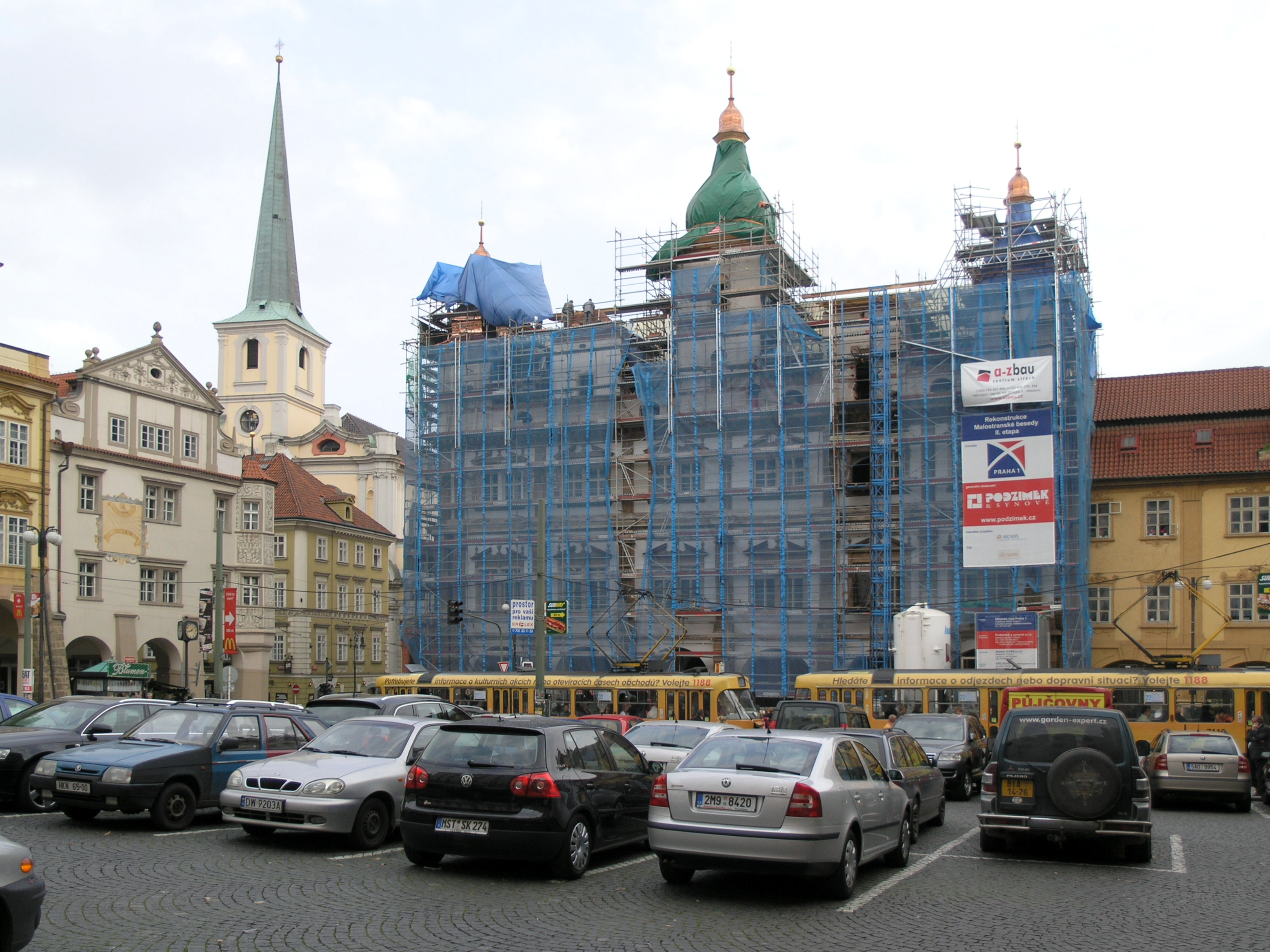 Praha, Malá Strana - Malostranské náměstí (pohled na rekonstruovanou Malostranskou besedu)